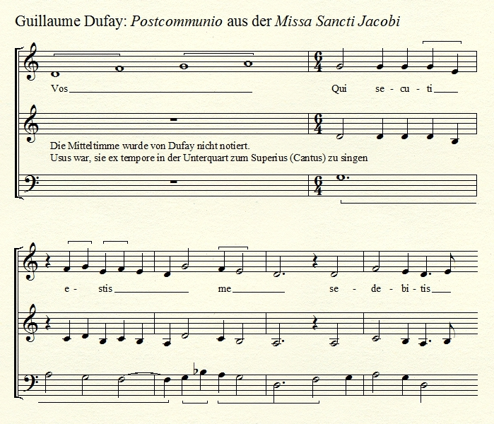 Übertragung und Bearbeitung eines Ausschnittes aus der Missa Sancti Jacobi von Guillaume Dufay